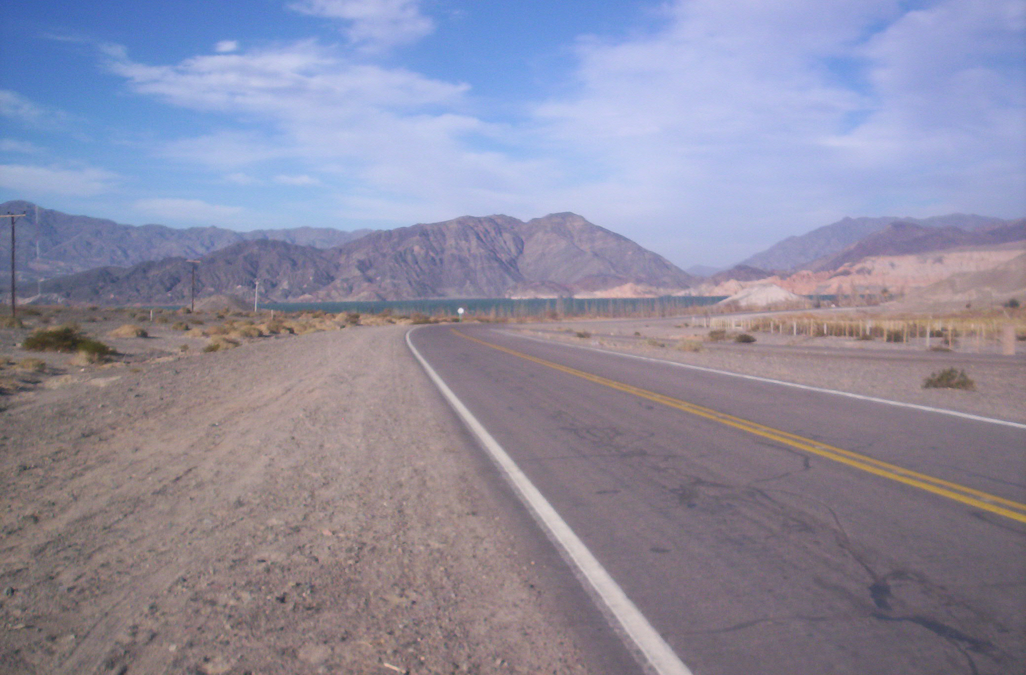 Vista de la Ruta Nacional 150, en Rodeo, al fondo el Embalse Cuesta del Viento, departamento Iglesia, provincia de San Juan, Argentina